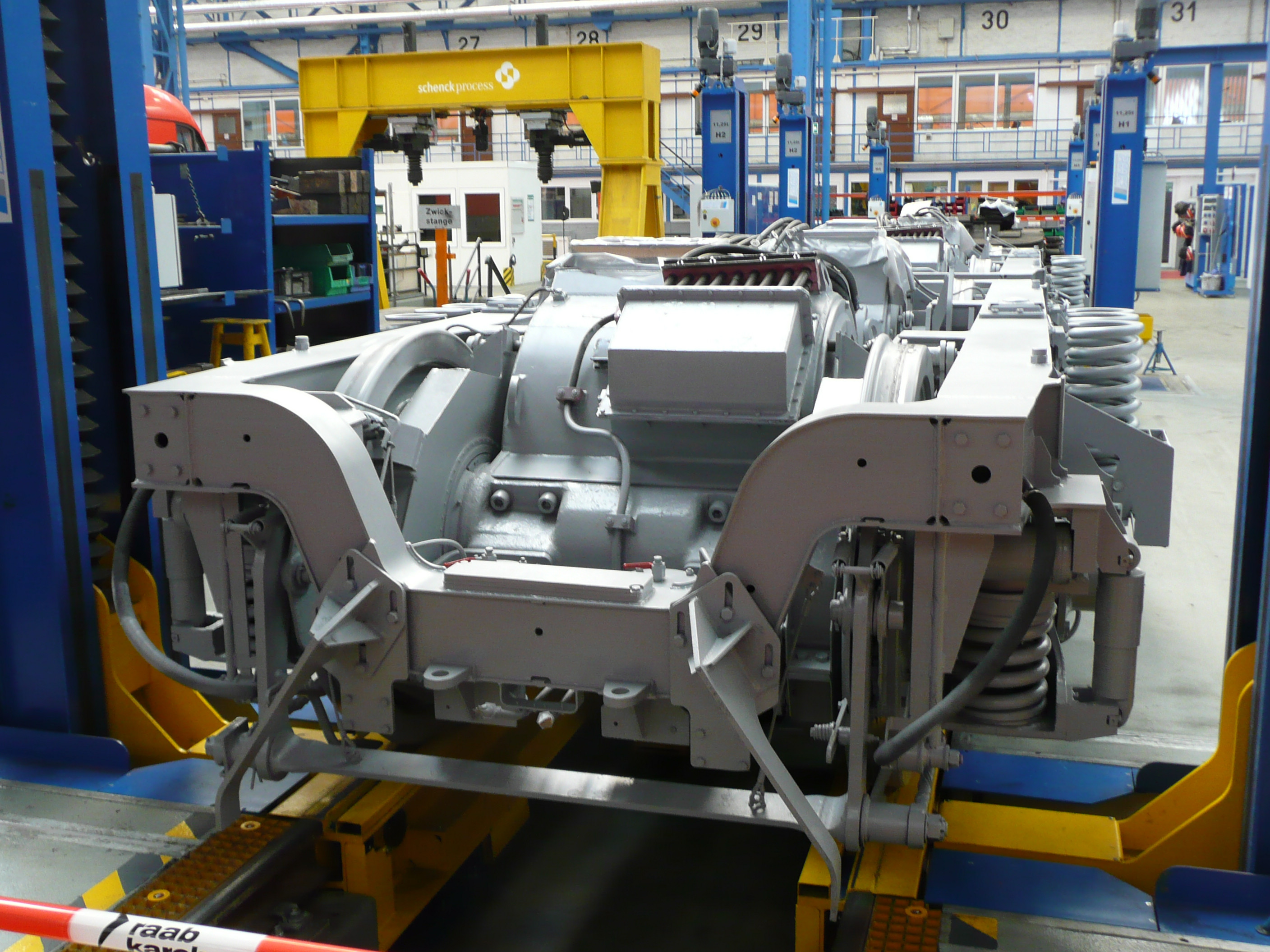 vollständiges Drehgestell der DB 155 im AW Dessau